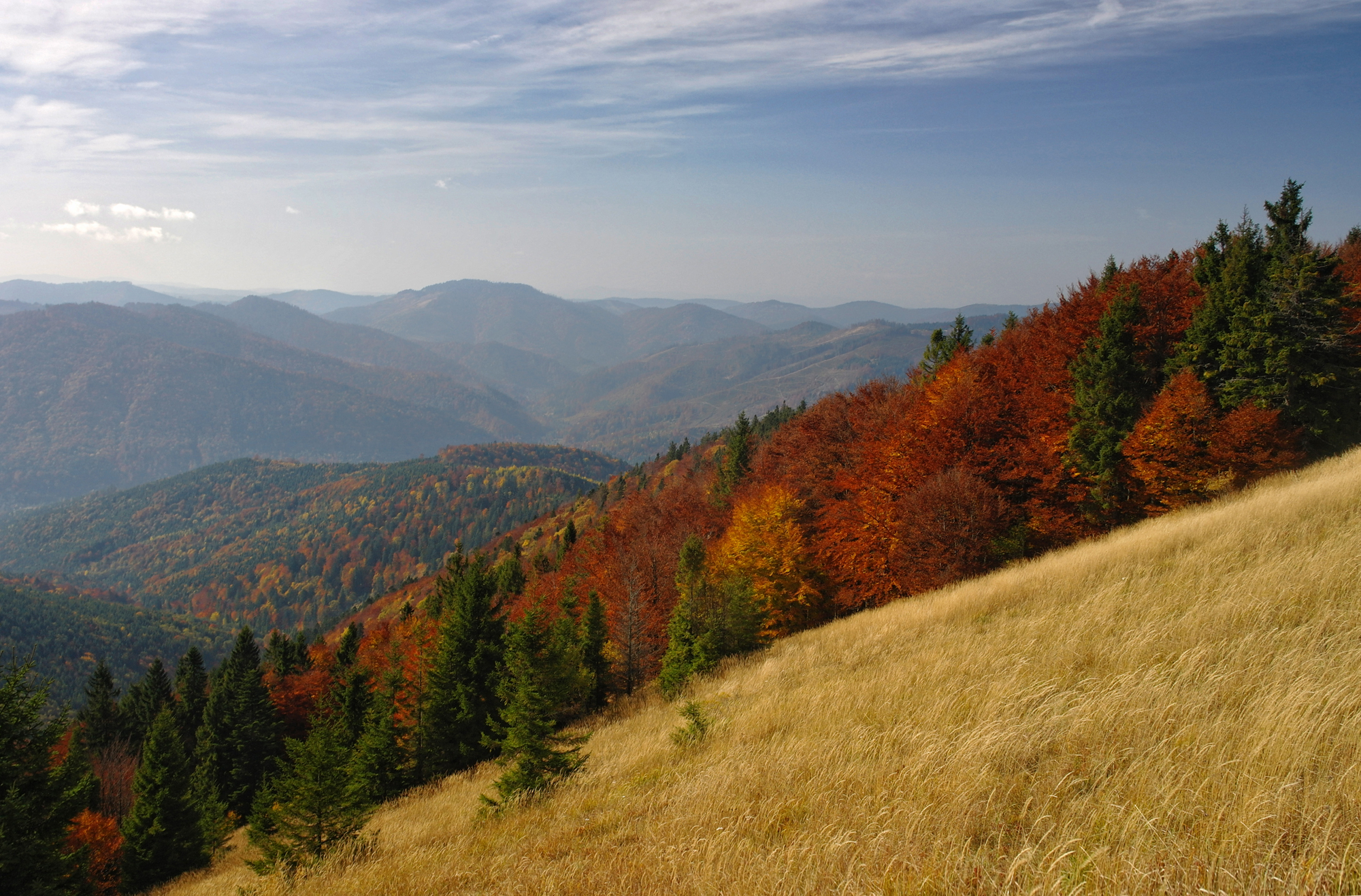 Осінь в Сколівських Бескидах